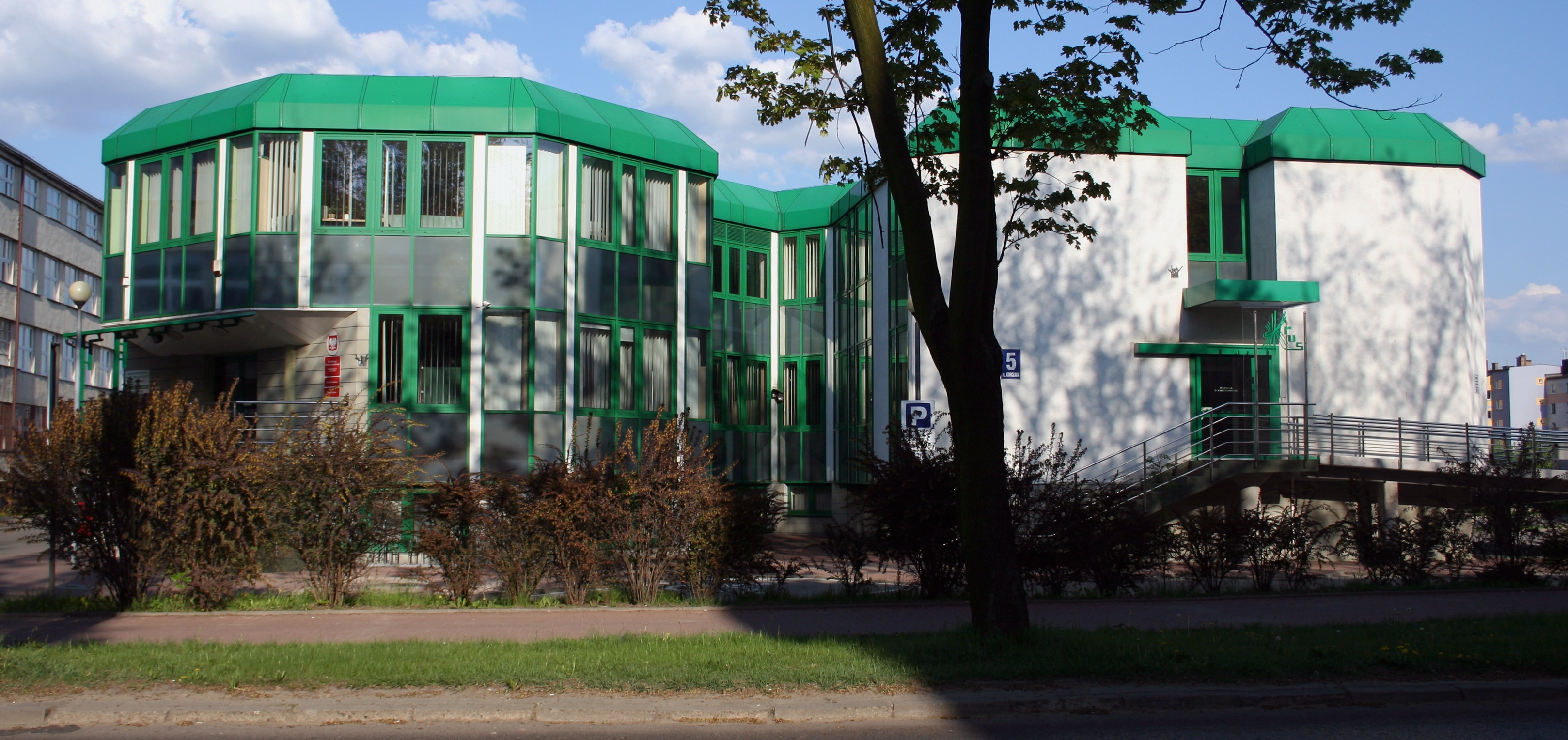 Częstochowa budynek KRUS, ul. Korczaka